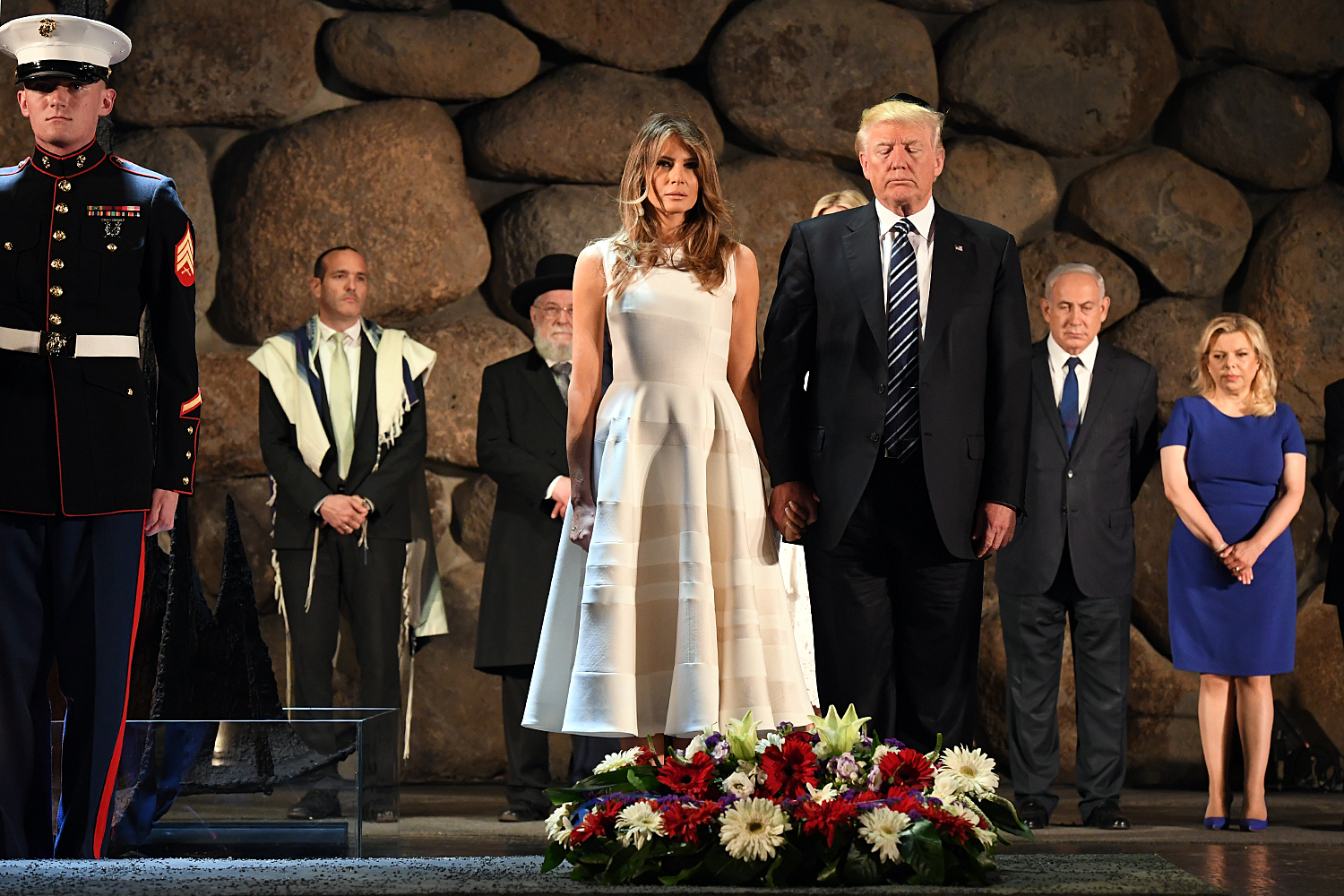 DSC_3982F